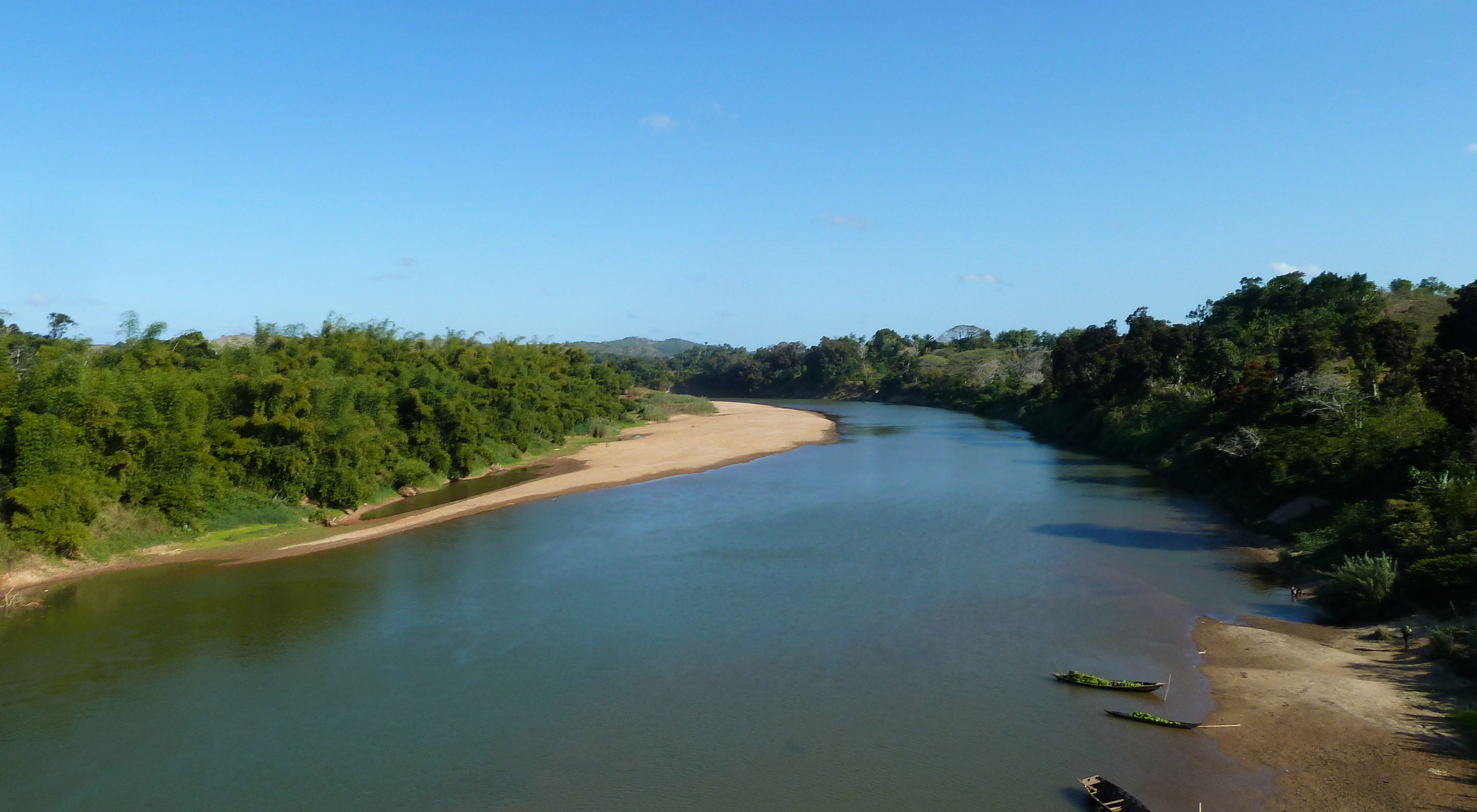 De Faraony gezien vanaf de RN 12.